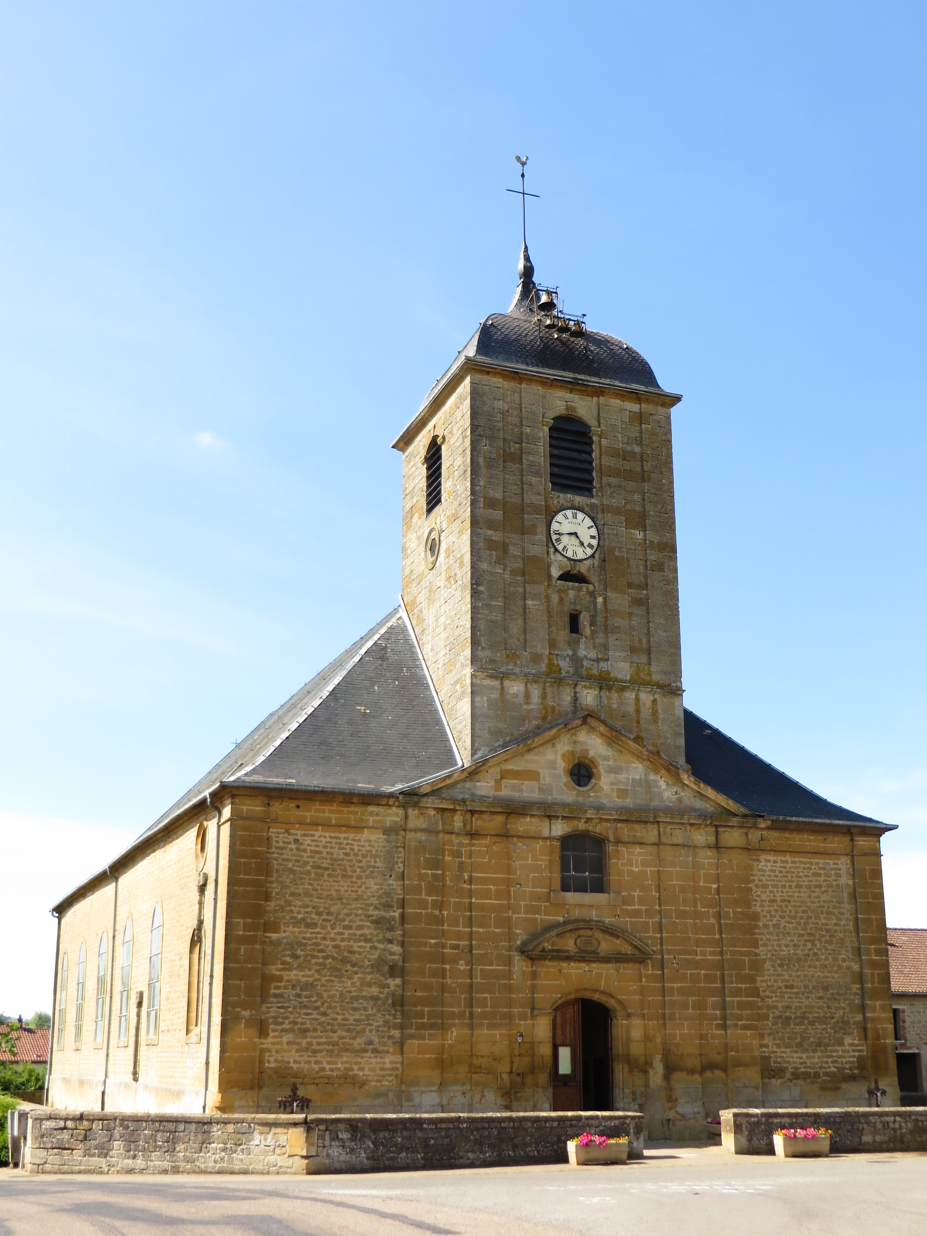 Juvigny-sur-Loison église Saint Denis